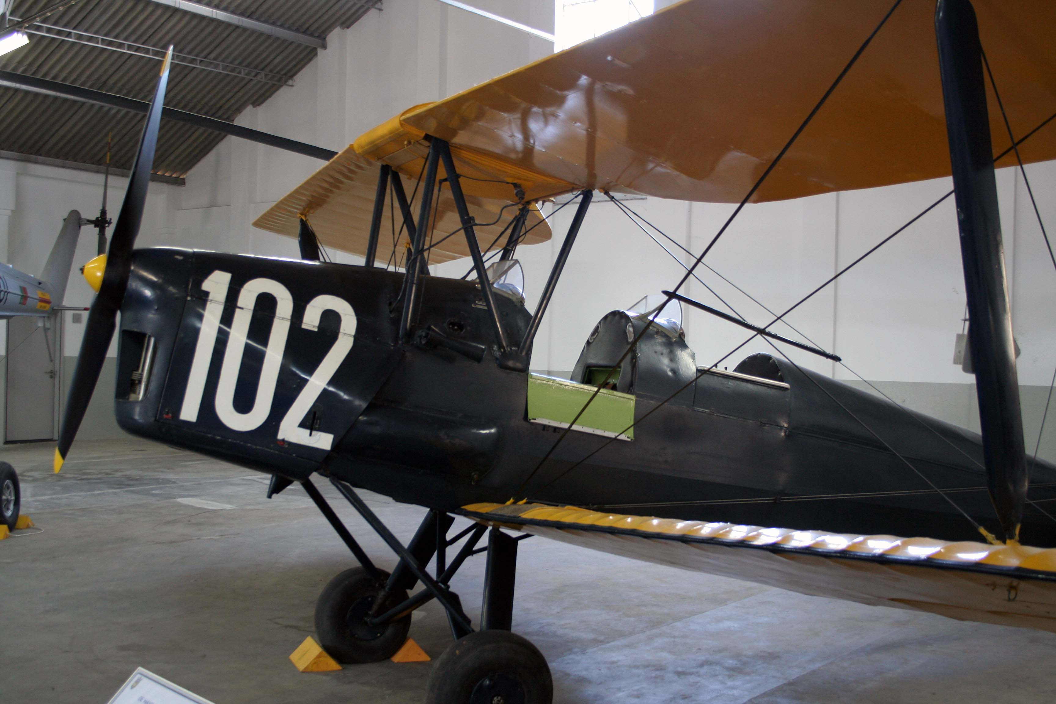 De Havilland DH-82 Tiger Moth Portuguese Air Force Military Aircraft - De Havilland DH-82 Tiger Moth Portuguese Air Museum Source/Author Soares da Silva